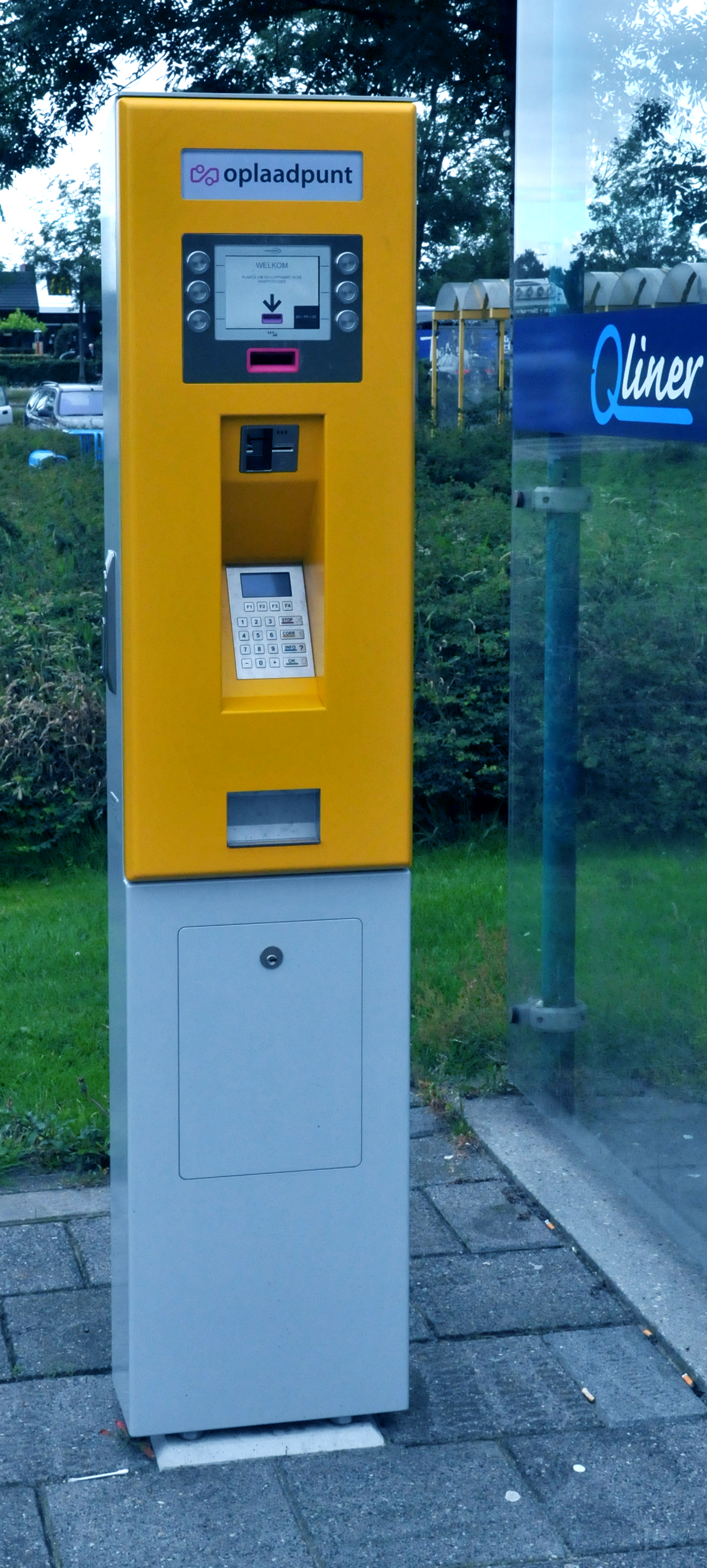 EnzoSystems OV-Chipkaart laadapparaat van het type AVM Outdoor. Hiermee kan een product worden geactiveerd of de OV-Chipkaart worden opgewaardeerd. [1]